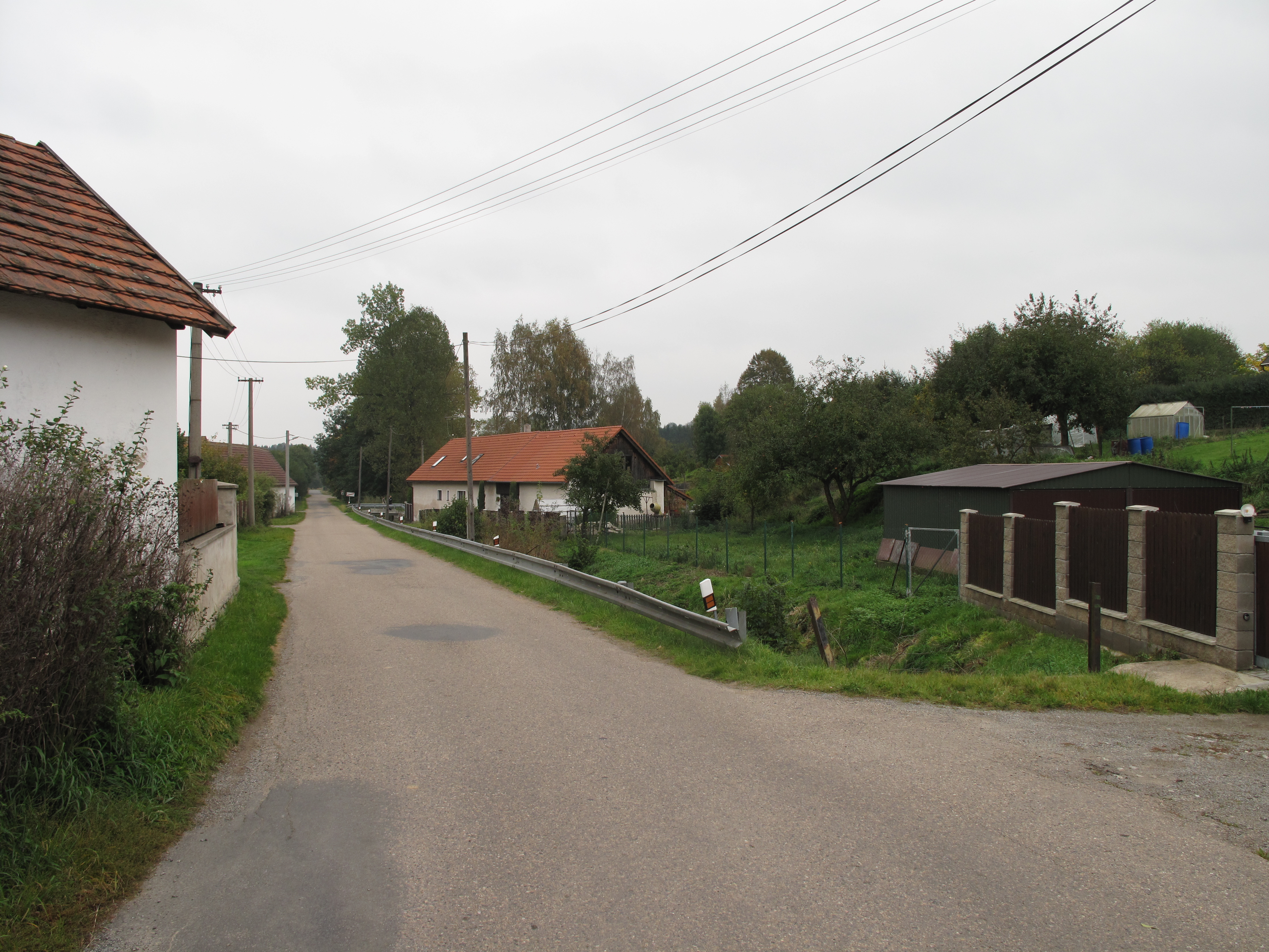 Silnice ve Vojslavicích. Okres Benešov, Česká republika.